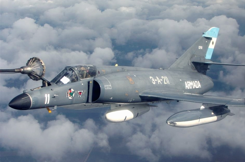 AMDBA Super Etendard 3-A-211.